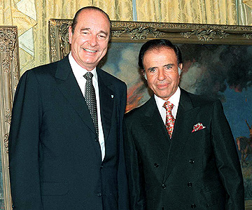 El presidente Carlos Menem ofreció una cena en honor del presidente francés, Jacques Chirac, en el Alvear Palace Hotel.